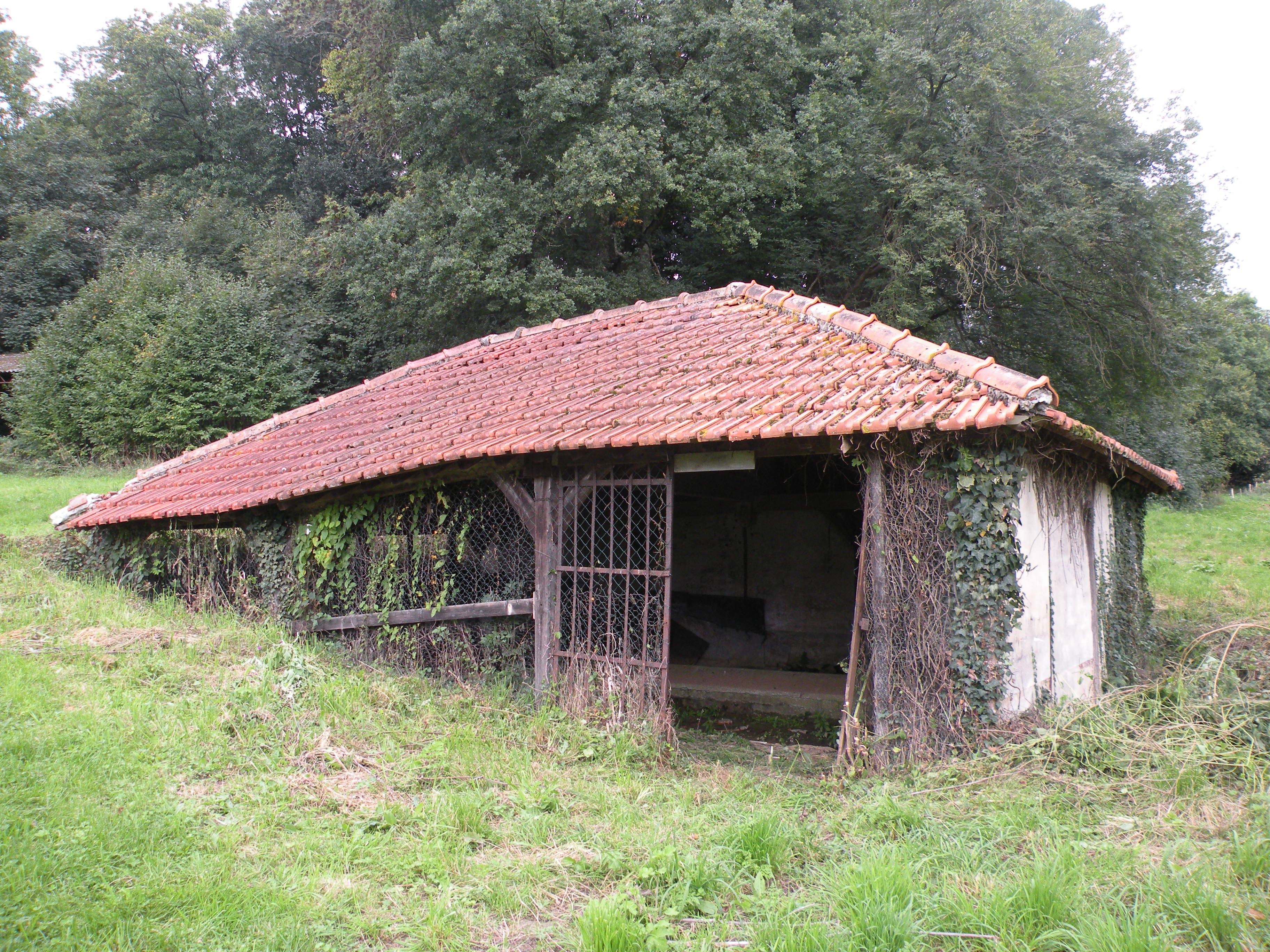 lavoir de 1802 à Saint-Martin-du-Tertre (Val-d'Oise)